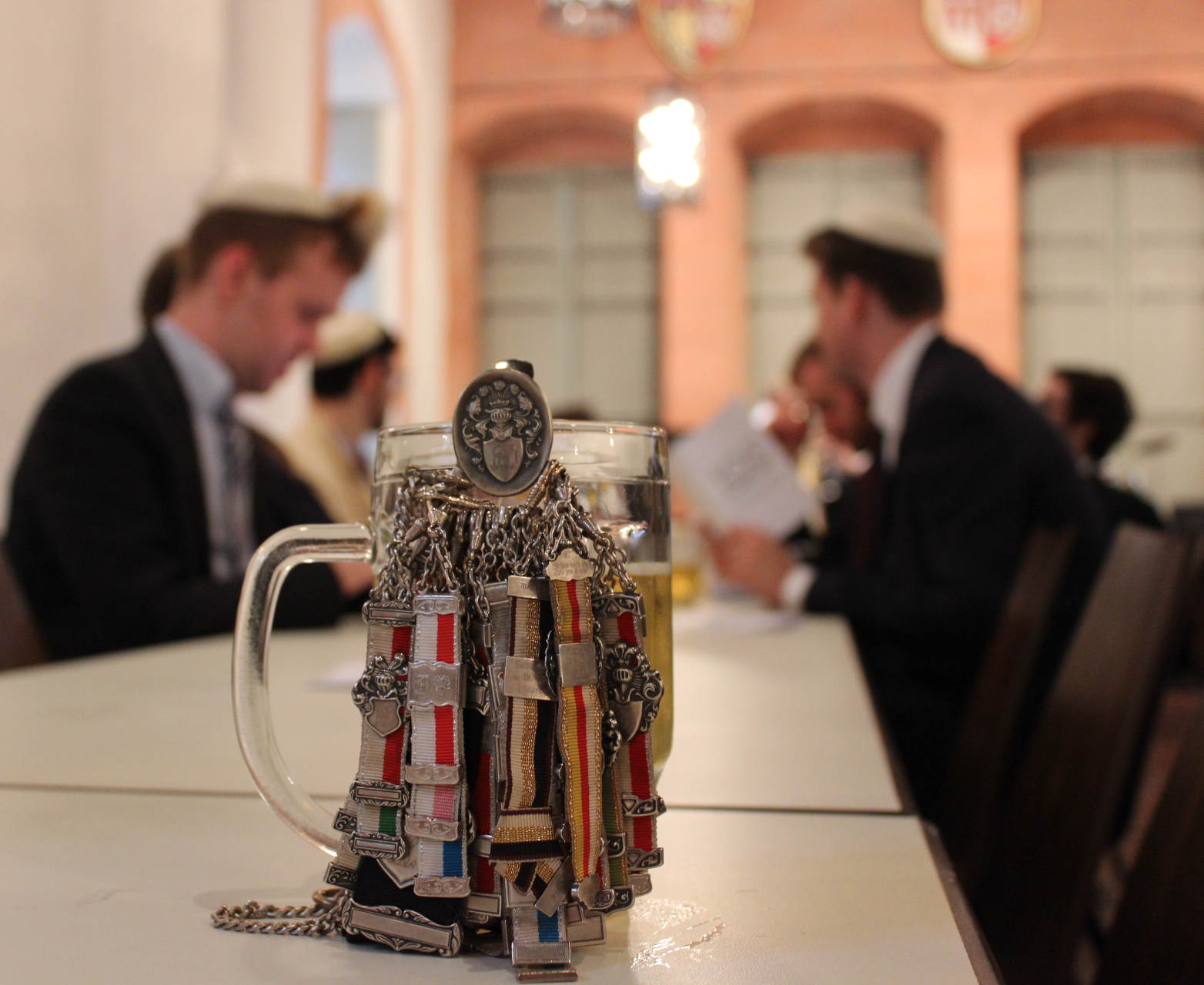 Aufnahme des Festcommerses im Innern des Alten Rathauses zur 100. Tagung des Miltenberger Rings